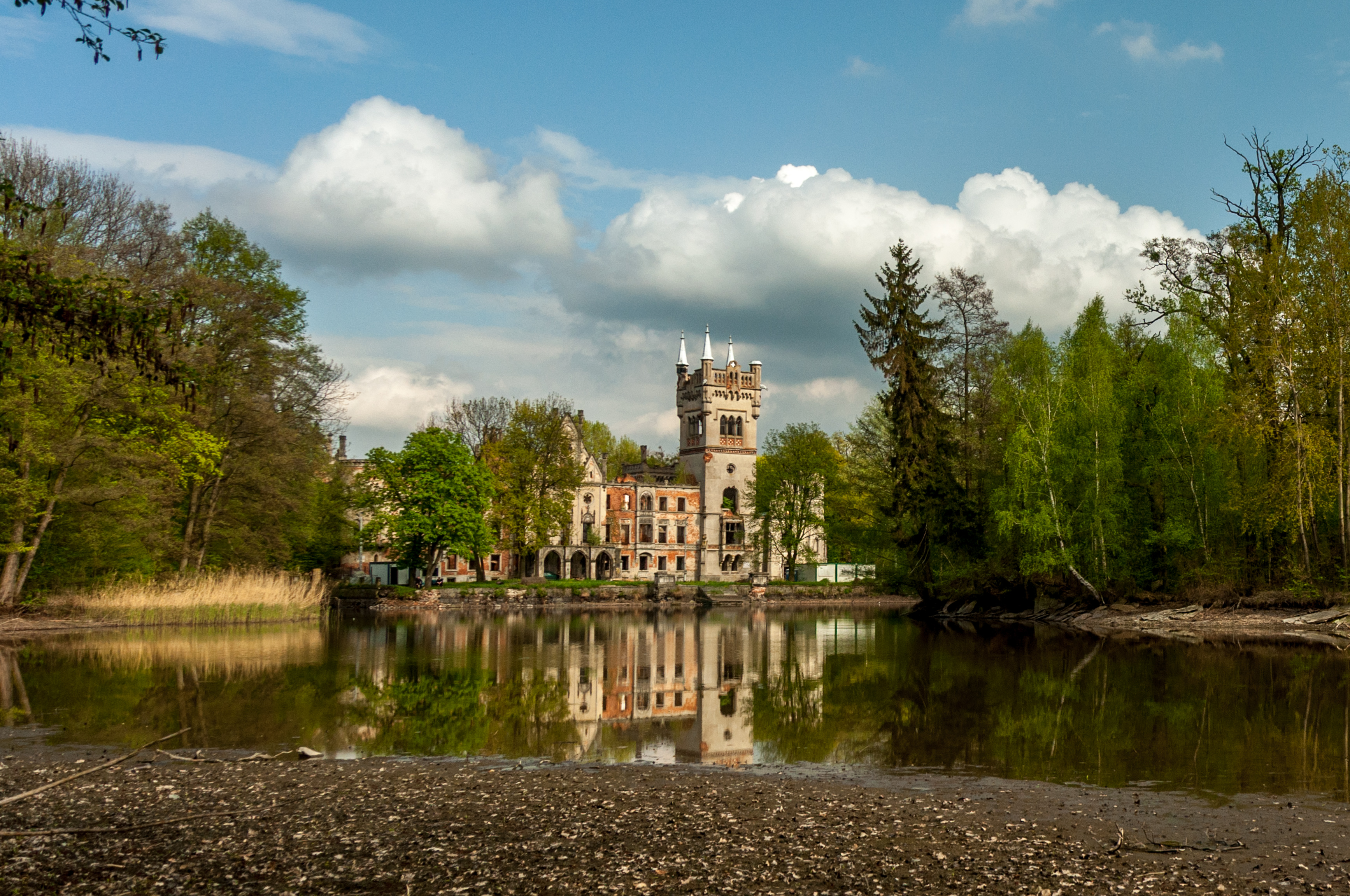 Kopice, pałac, 1864